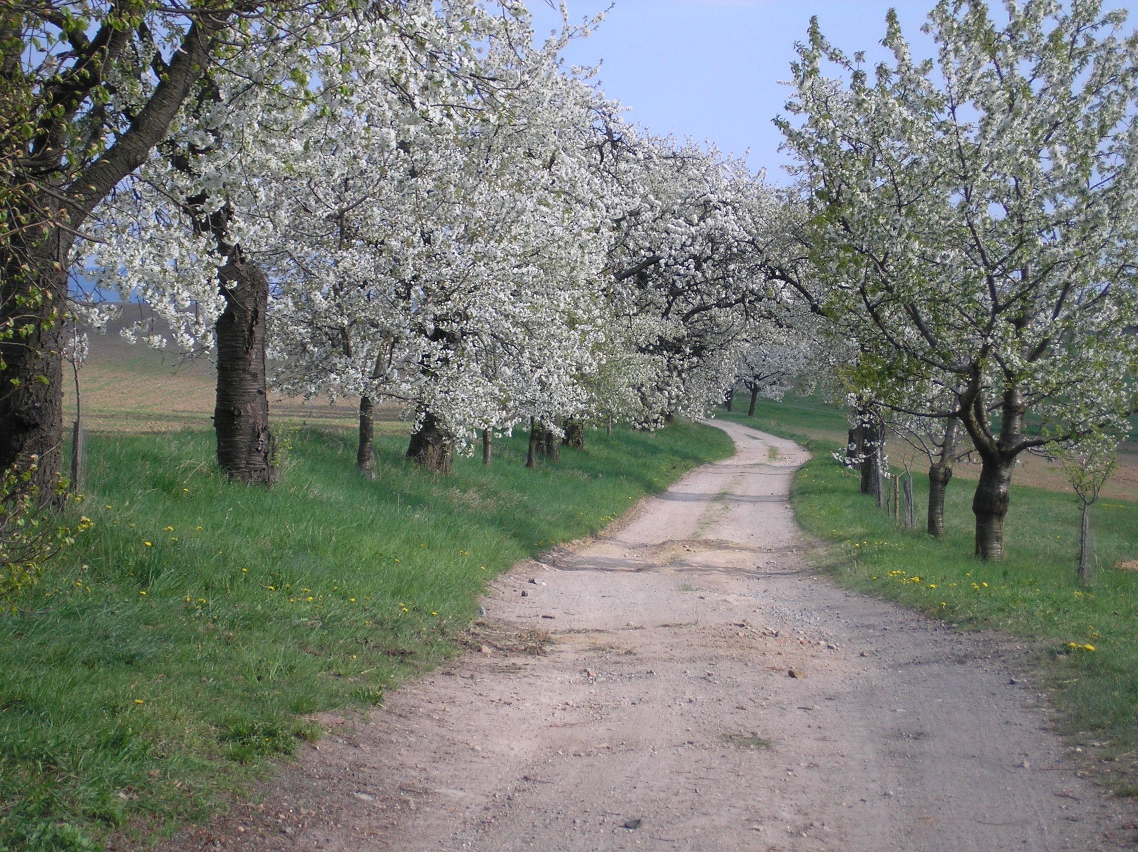 Polní cesta s třešňovou alejí